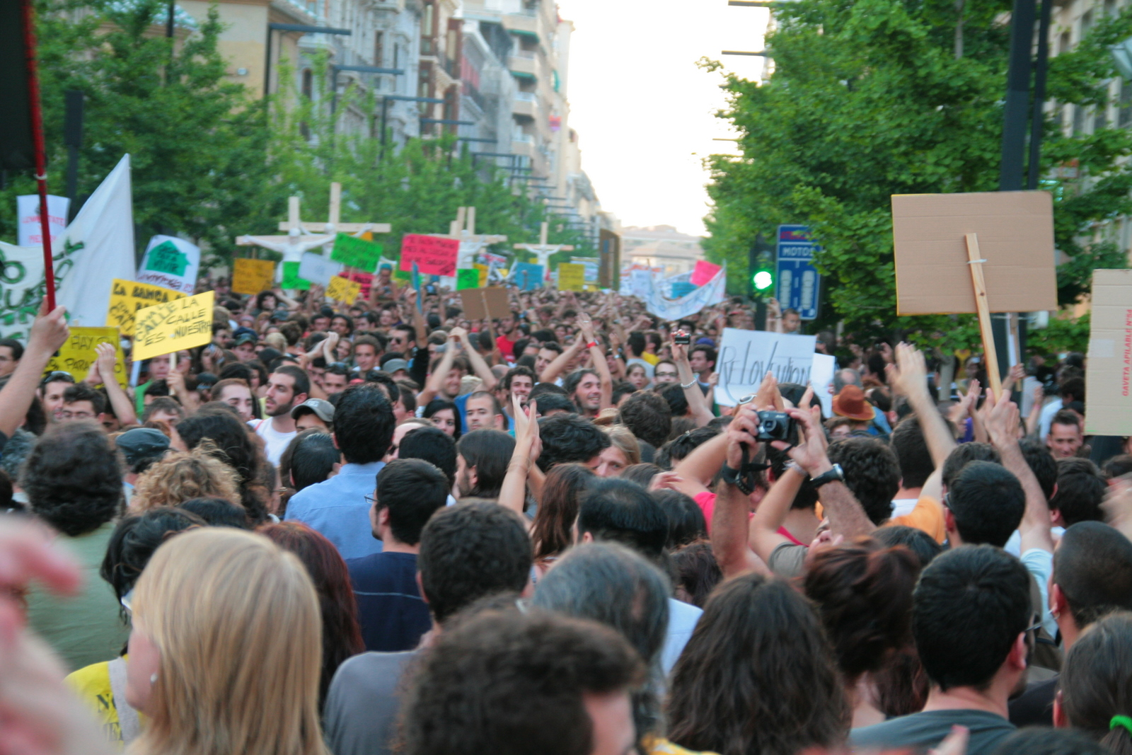 Manifestación en la Gran Vía de Granada el 15 de mayo de 2011 a favor de la Democracia Real.